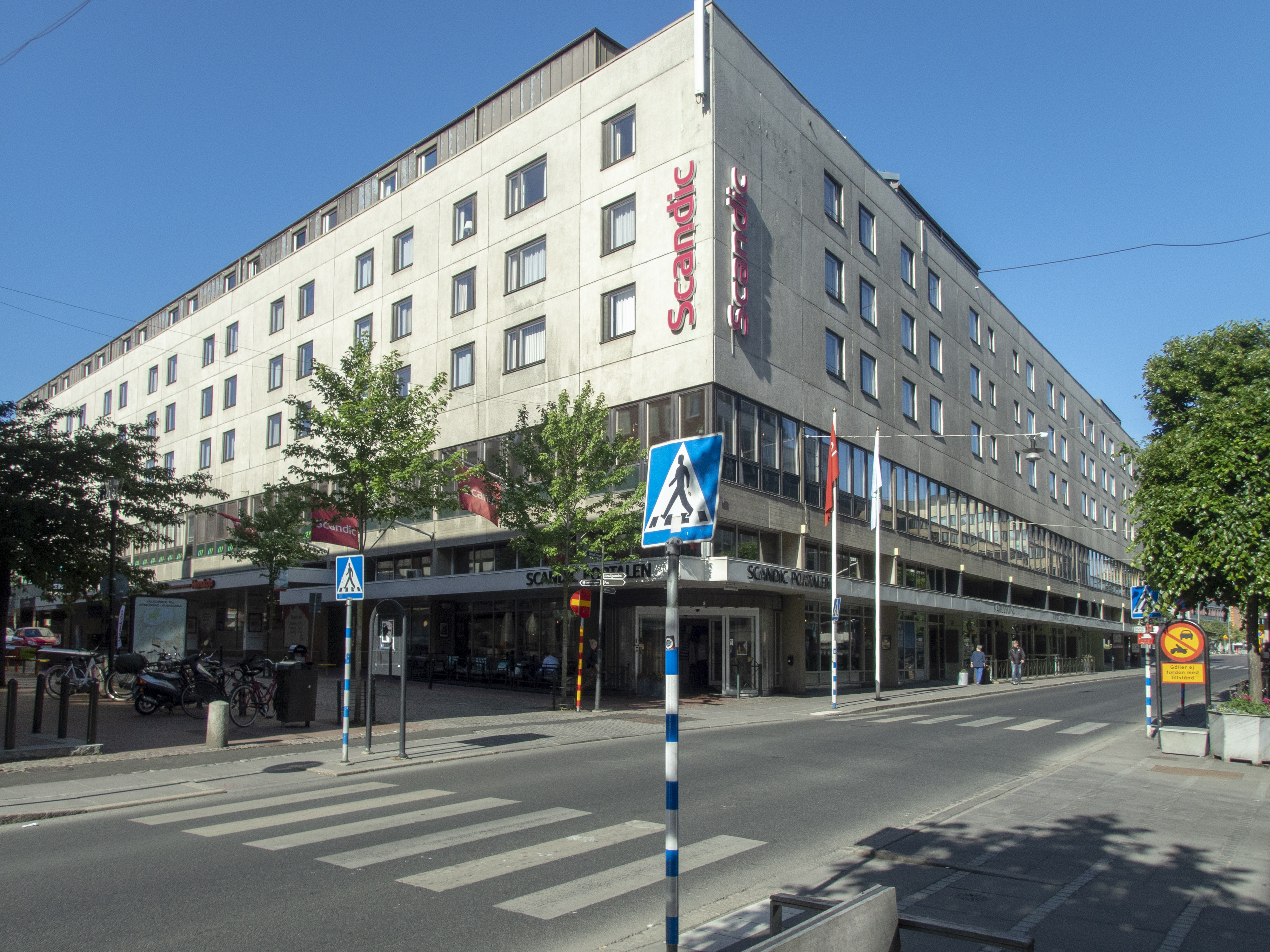 Scandic Portalen, Västra Storgatan 9-13 Jönköping. Byggnadsår 1963. Arkitekter: Reed Andersson, Arne Delborn, Lars Theander, Evald Johannergård